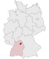 Hohenlohekreis, Baden-Württemberg, Germany